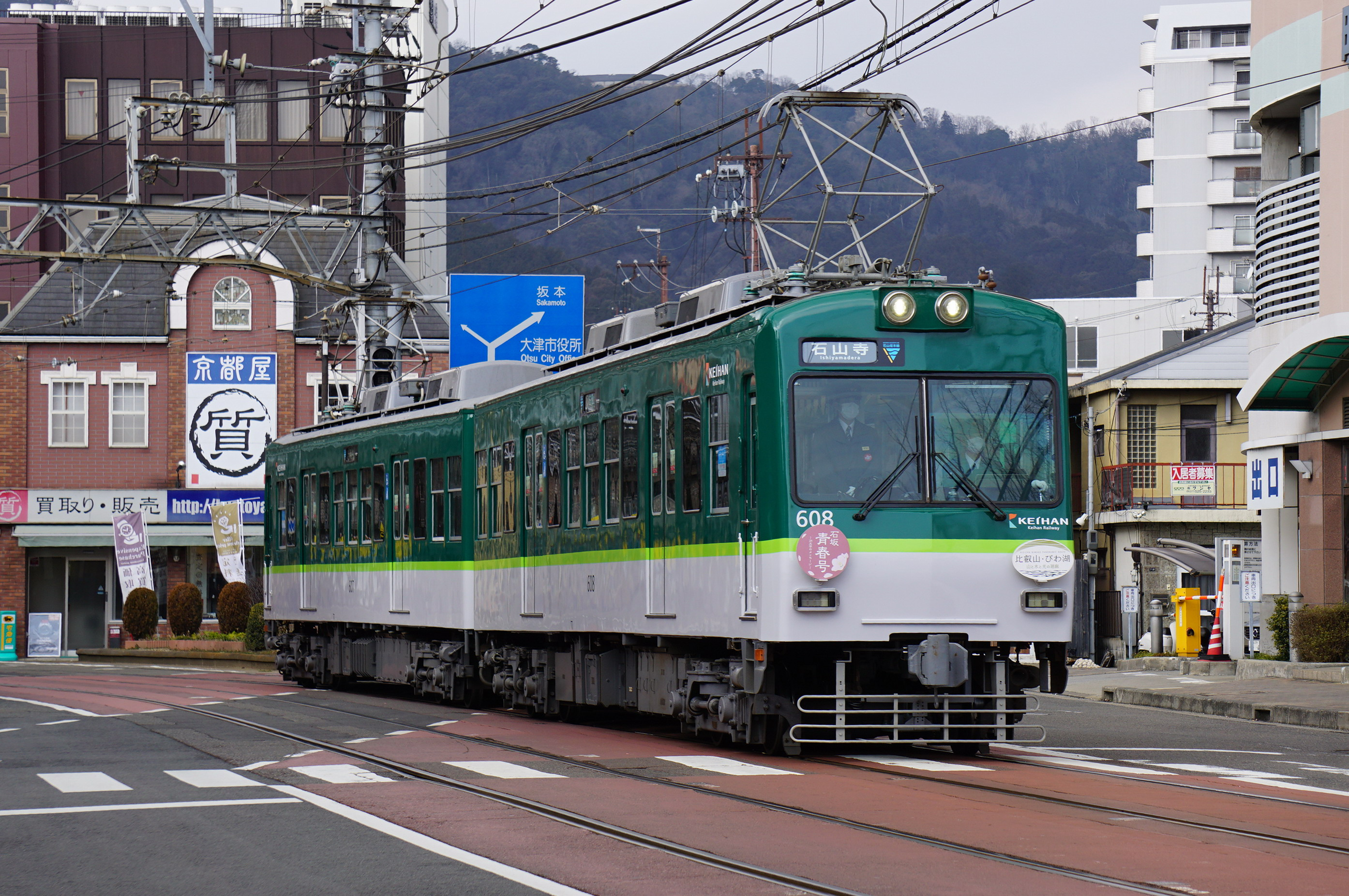 新塗装になった608号車 Sony ILCE-6000